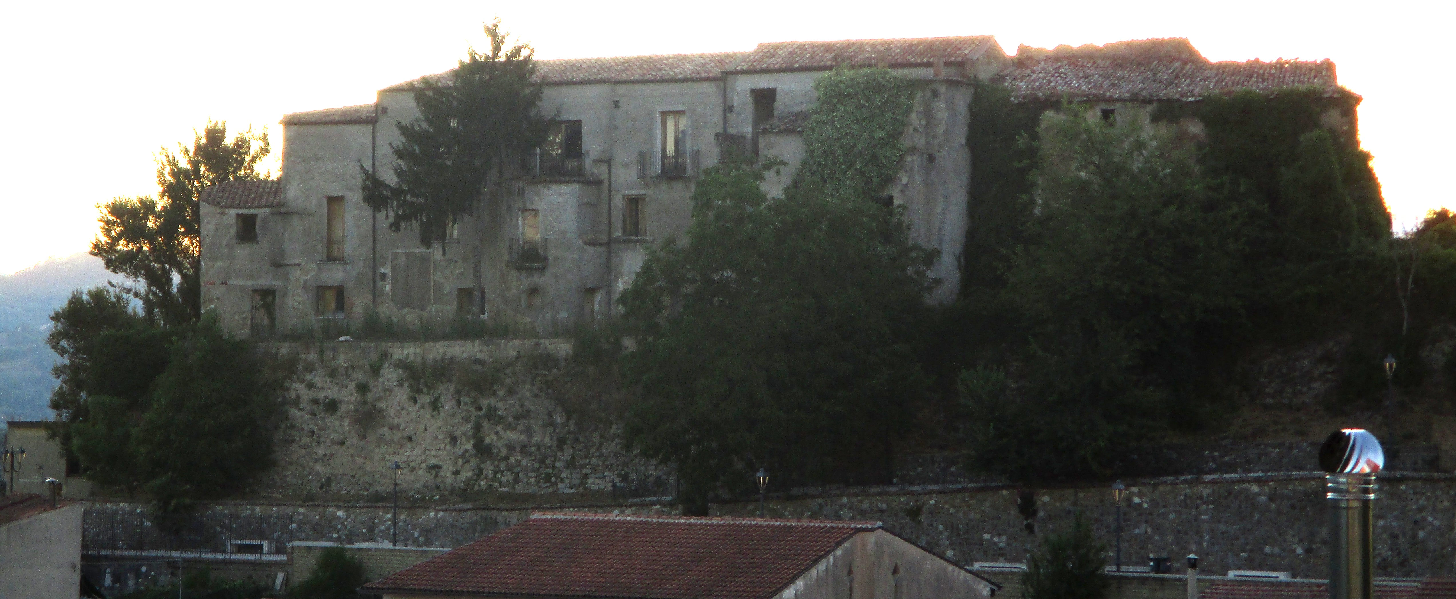 Vista del castello di Tufo (AV)